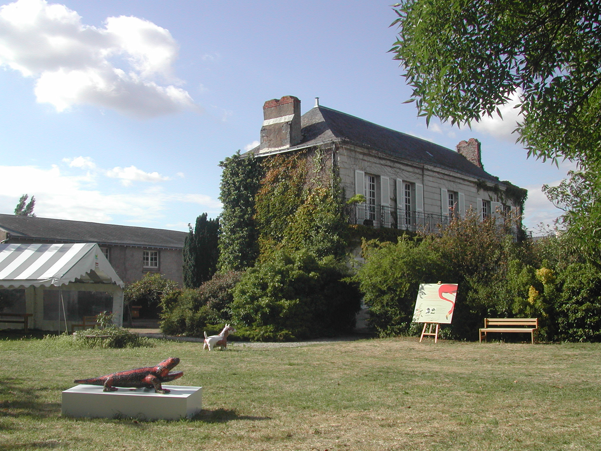 La demeure où Jean-Jacques AUDUBON a passé son enfance